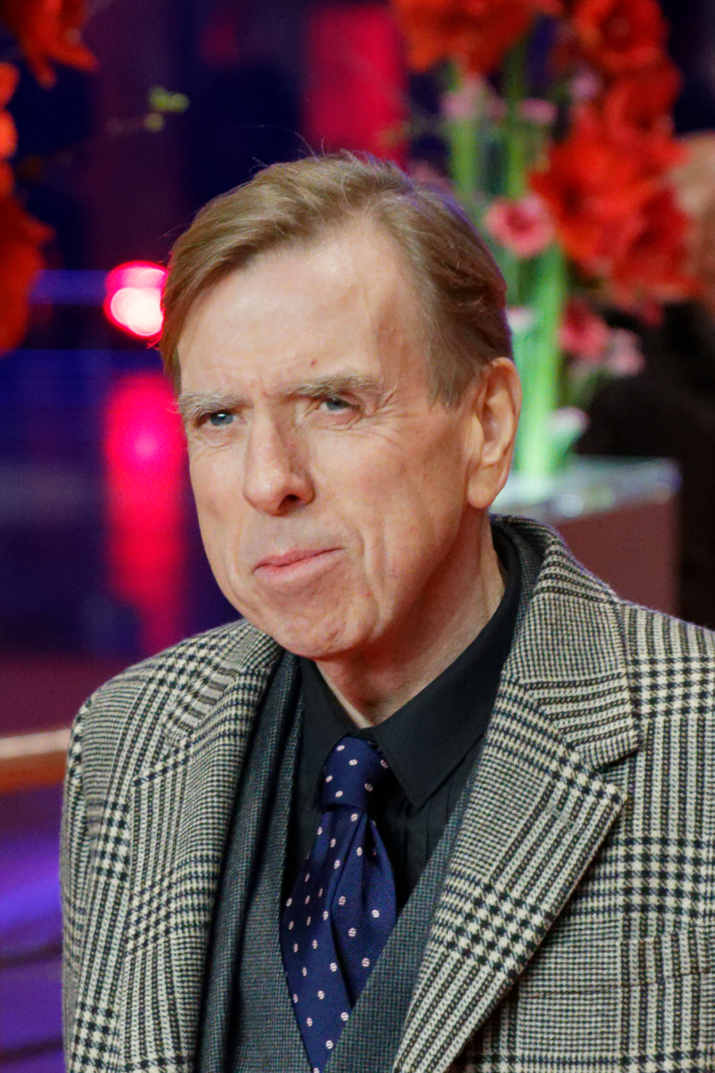 Timothy Spall bei der Weltpremiere von The Party im Rahmen der Berlinale 2017